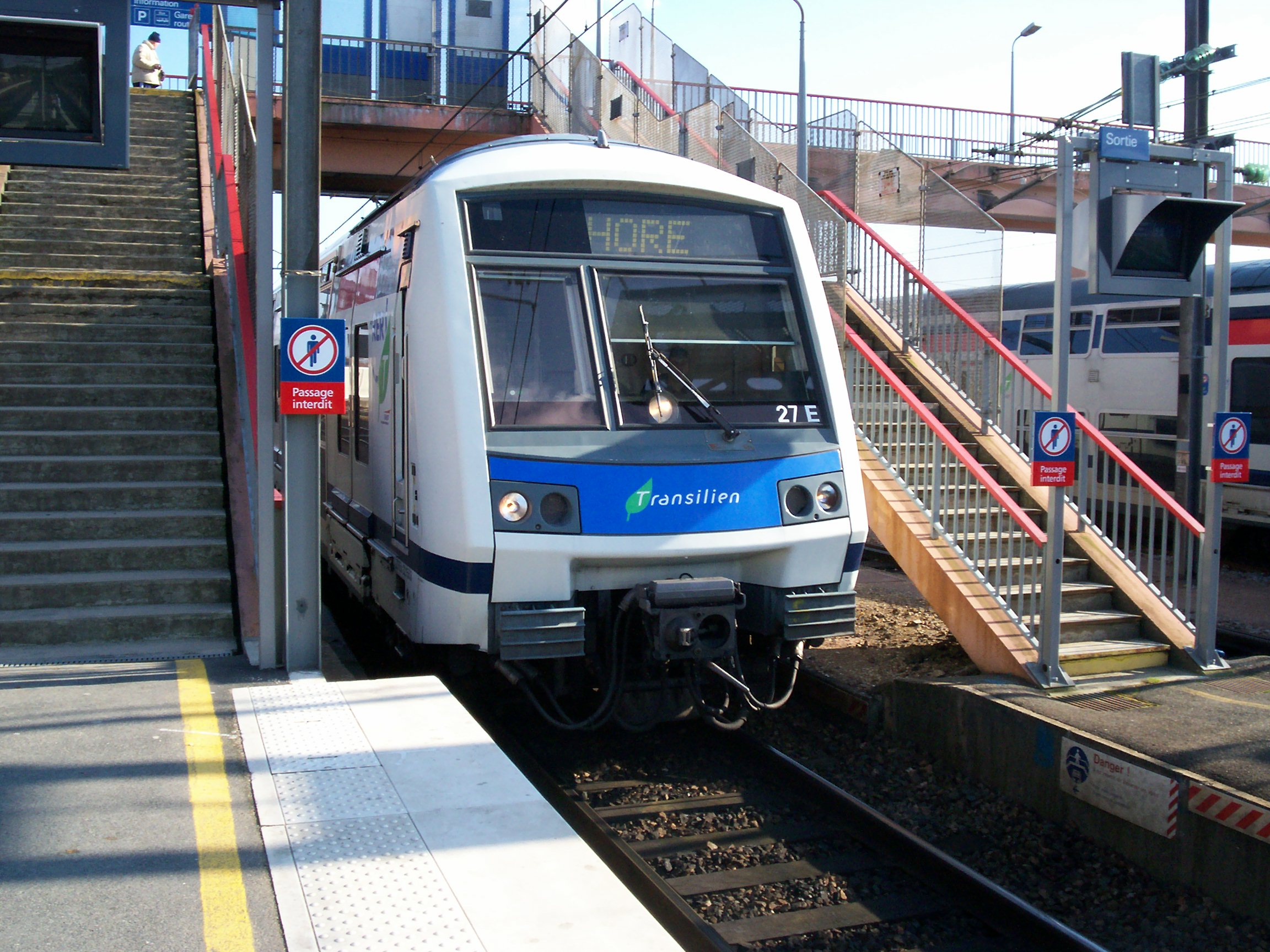 Rame Z 22500 à Gretz-Armainvilliers code HORE